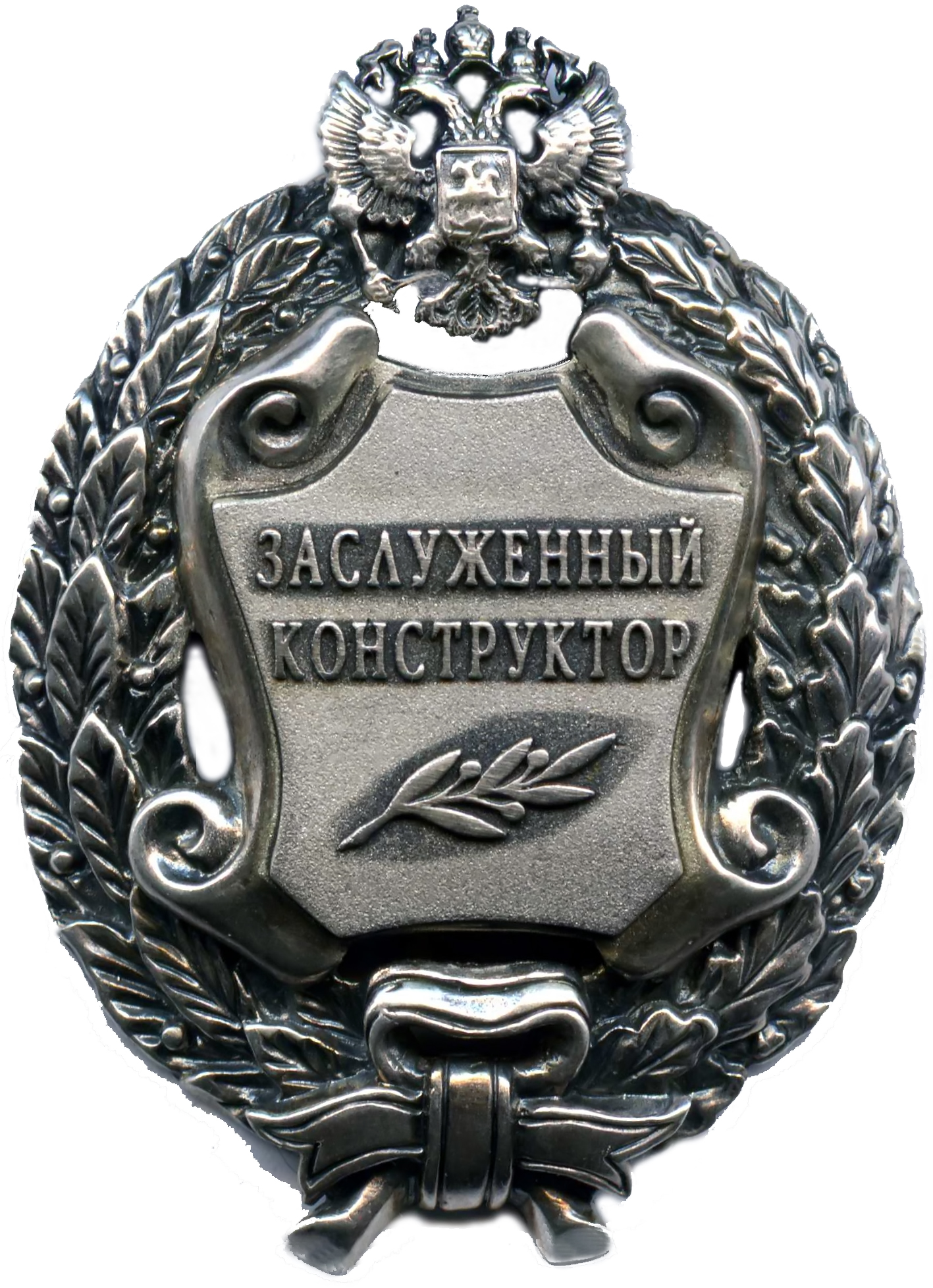 Заслуженный конструктор Российской Федерации Нагрудный знак.